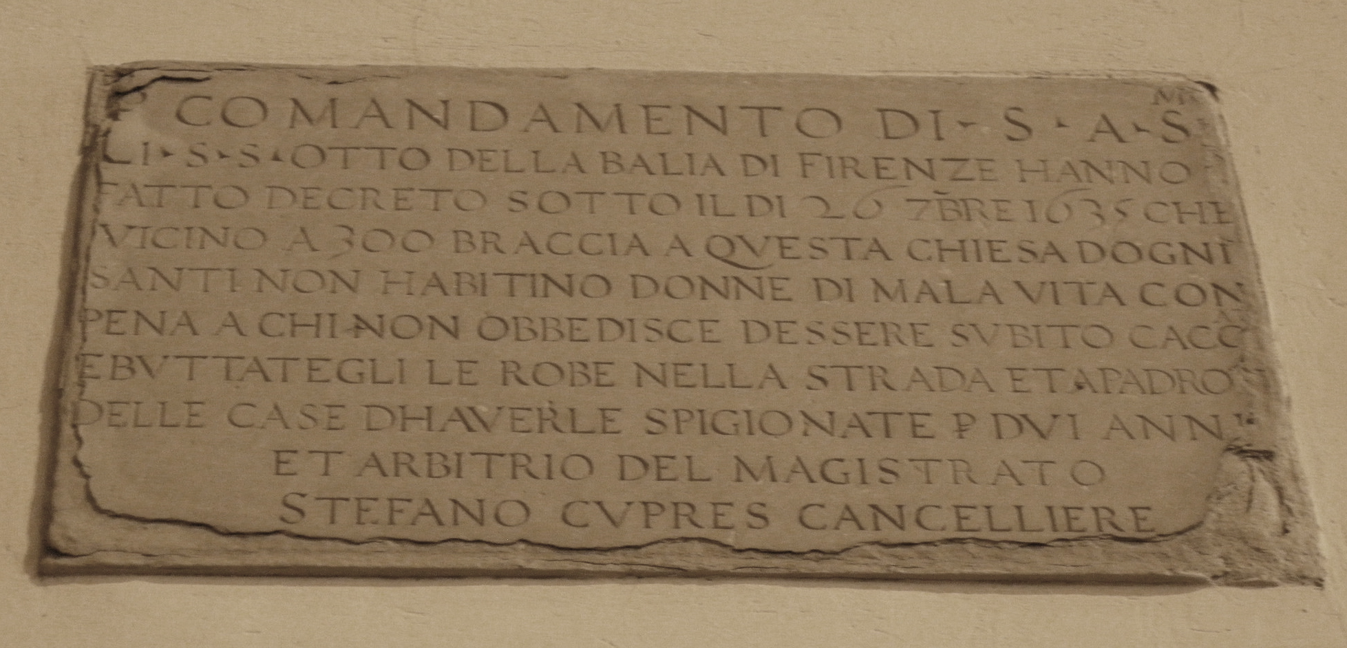 Targa signori otto contro il meretricio, ognissanti